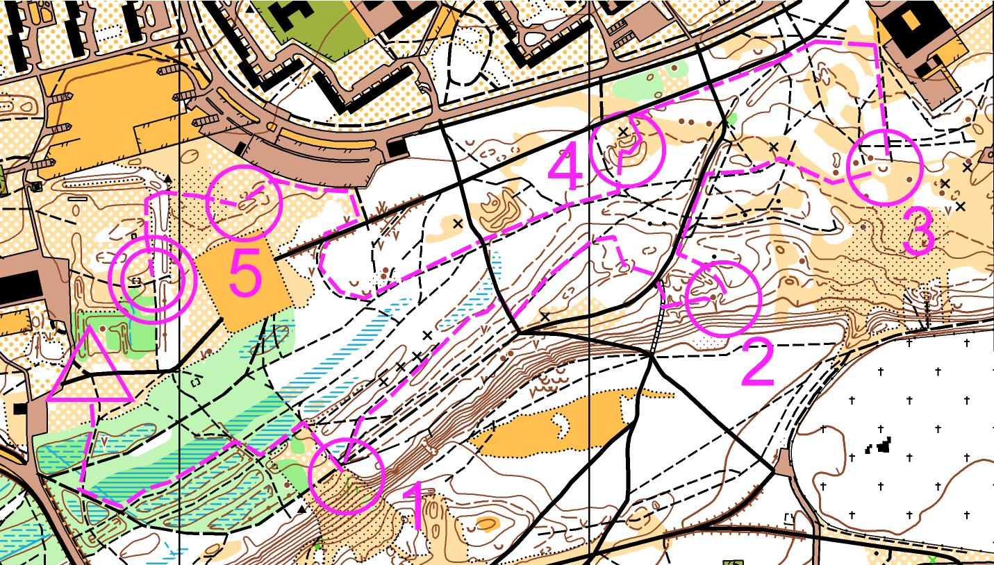 Orienteerumise nöörirada